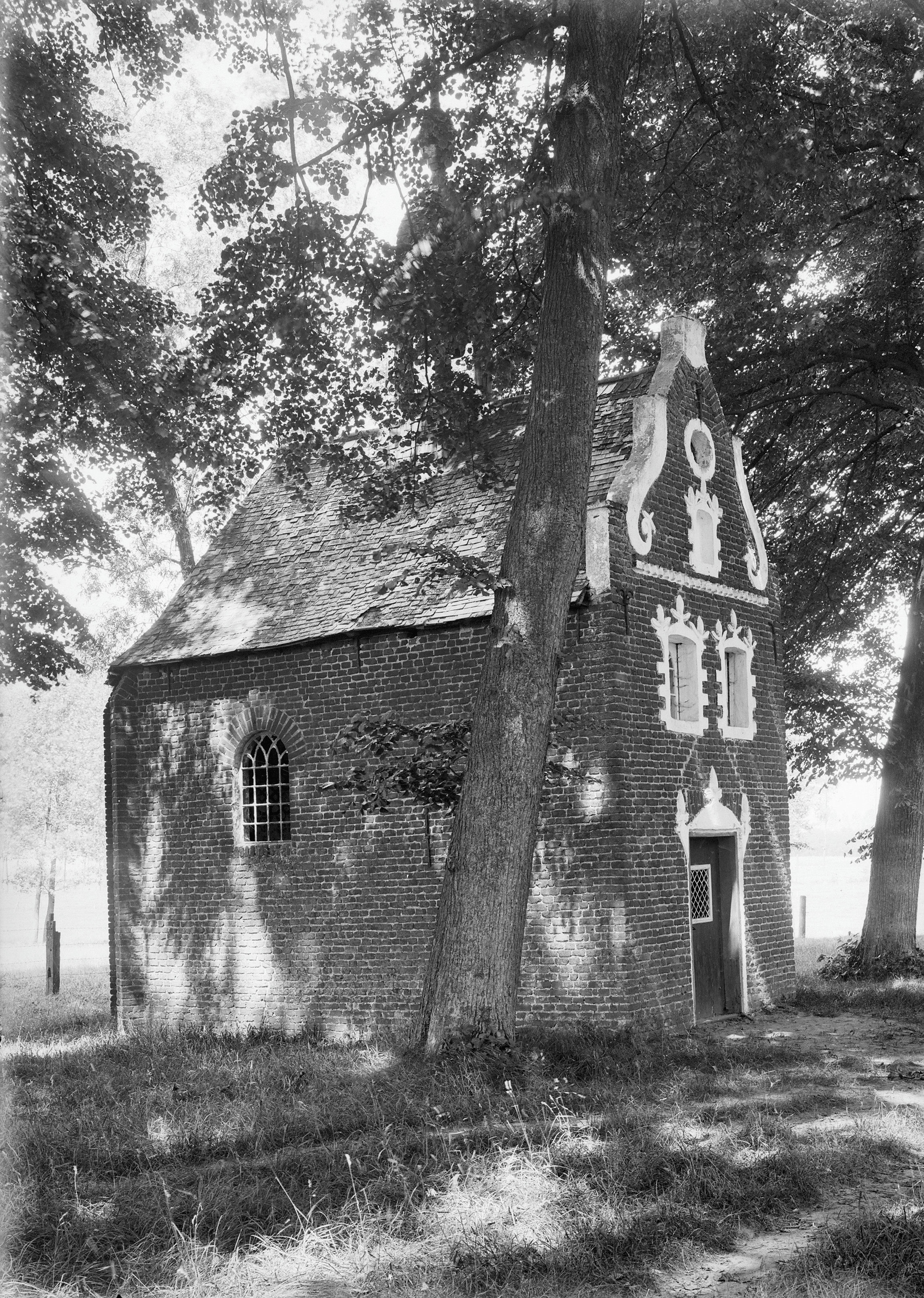 Hoofdgebouw: Sint Barbarakapel